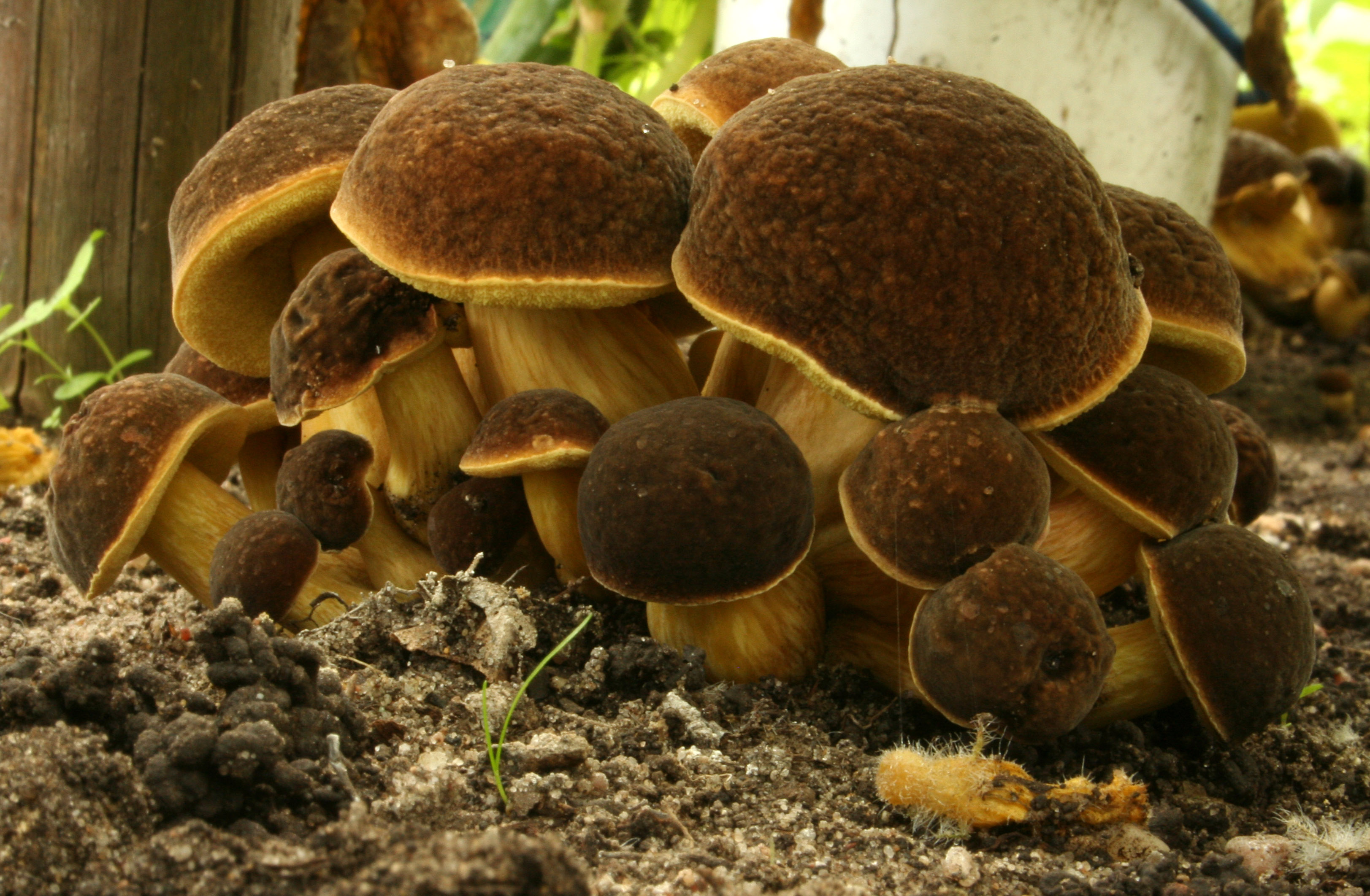 Xerocomellus engelii